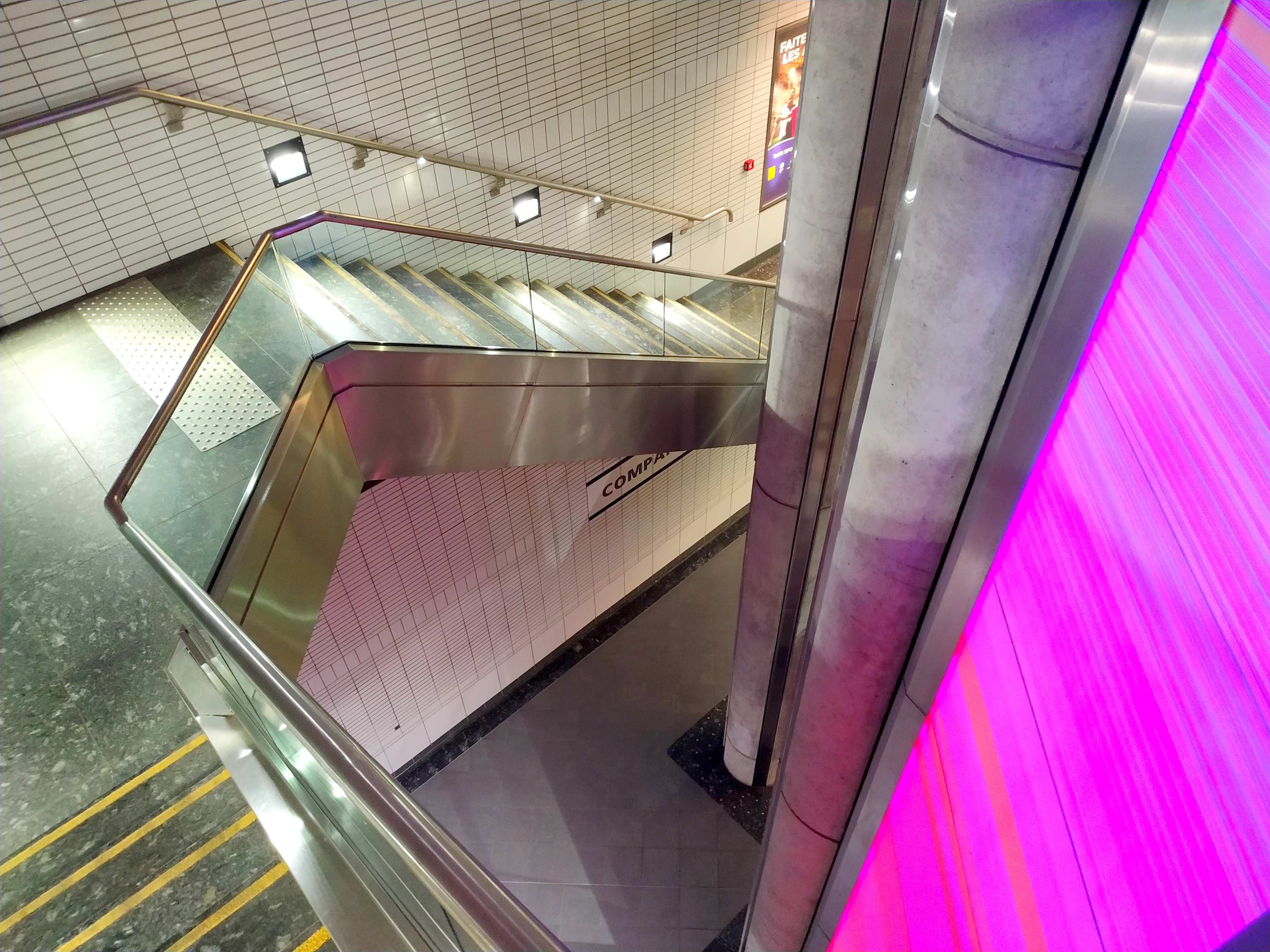 Escalier de quai dans la station Compans-Caffarelli de la ligne B du métro de Toulouse.